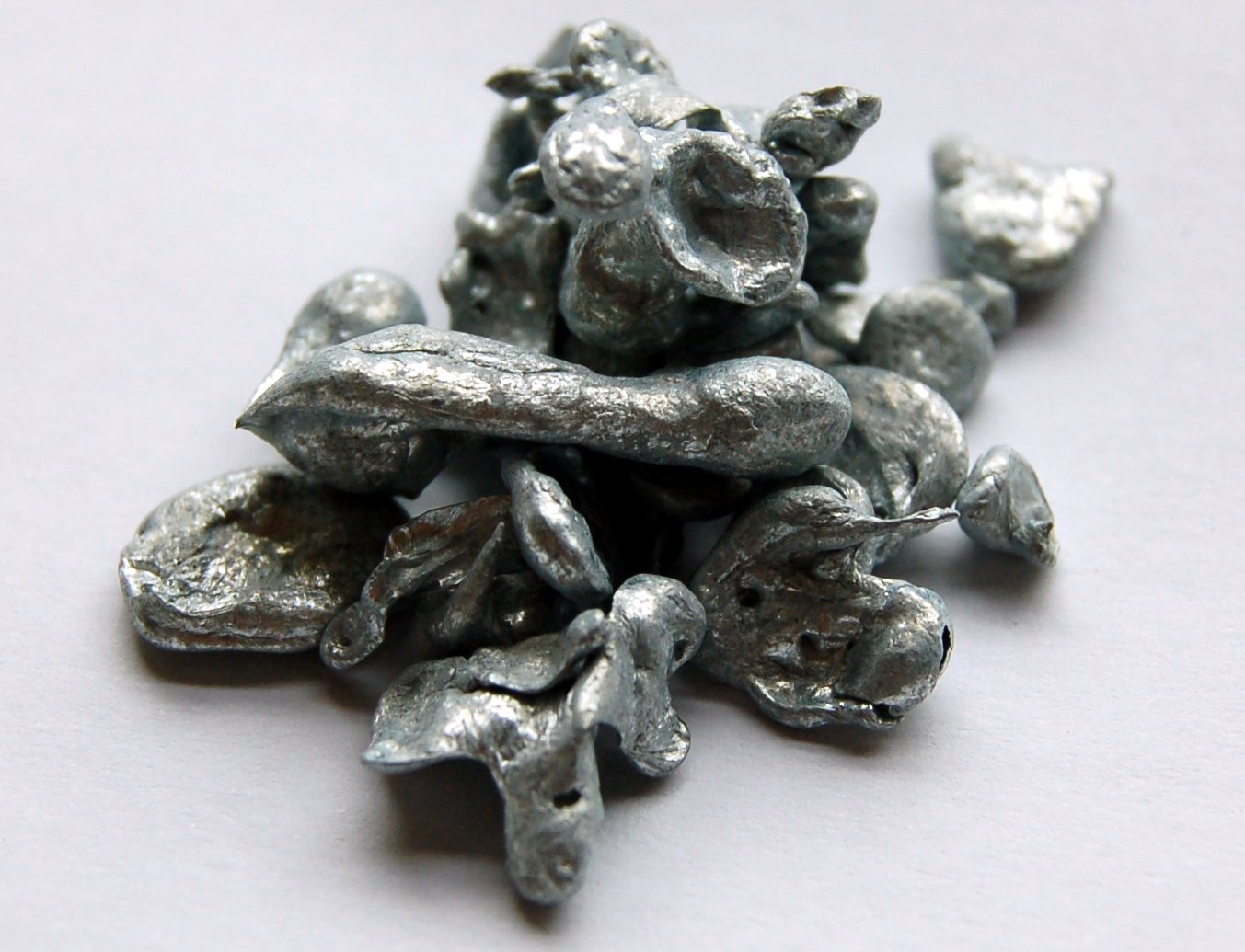 Zinc sample